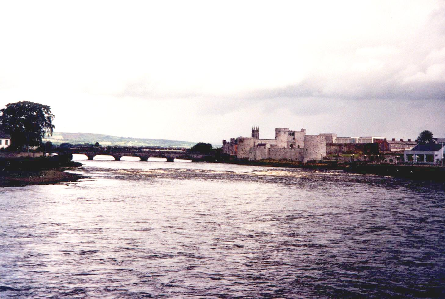 River Shannon in der Stadt Limerick (Irland)